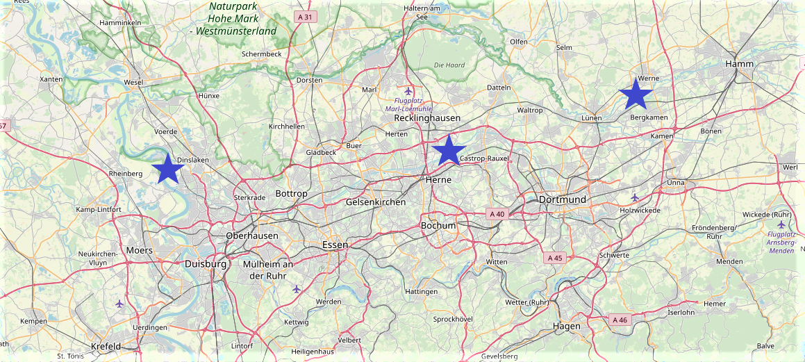 Die Karte zeigt die Plätze der Zukunftsgärten der Internationalen Gartenausstellung 2027 ohne Leistungsschau des Gartenbaus